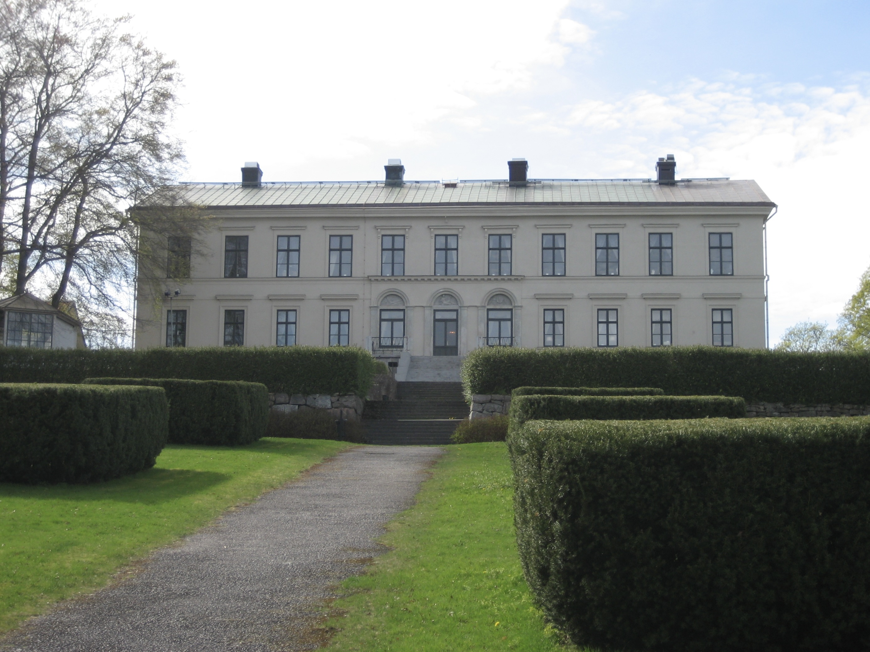 Karlslunds Herrgård, Örebro, Sweden